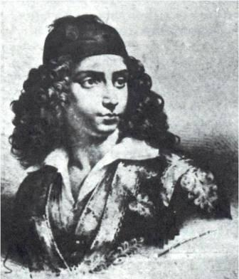 Πορτραίτο του Θεμιστοκλή Βισβίζη, γιος της Δόμνας Βισβίζη